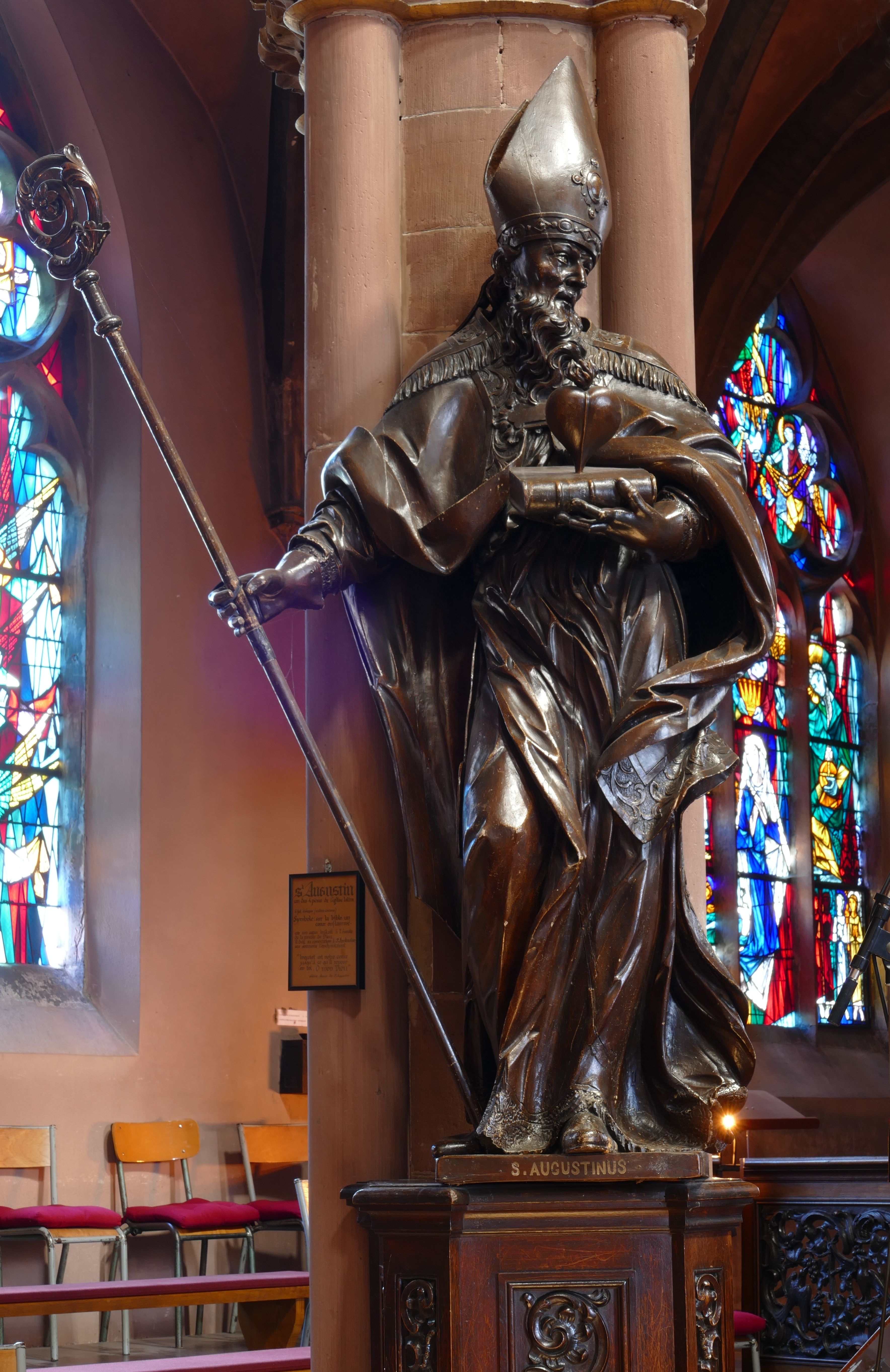 Alsace, Bas-Rhin, Église Saint-Nicolas de Haguenau, (Ancienne église du Couvent des Prémontrés) (PA00084725, IA00061903). Les 4 Pères de l'Église (XVIIIe): St-Augustin. This object is classé Monument Historique in the base Palissy, database of the French furniture patrimony of the French ministry of culture, under the references PM67000600 and IM67002162.